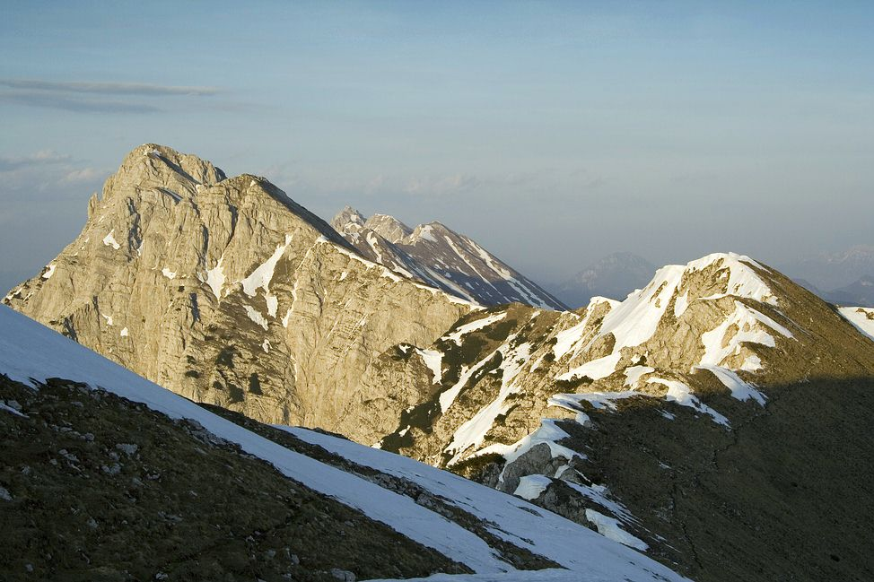 Kladivo - 2192m